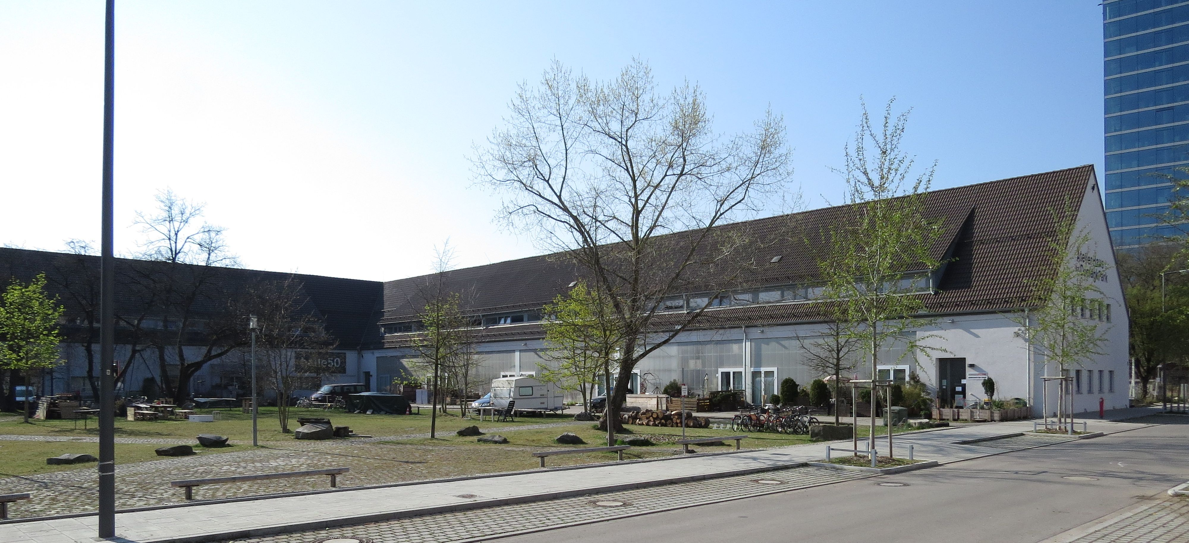 Städtisches Atelierhaus im Domagkpark, Halle 50, Schwabing-Freimann, München